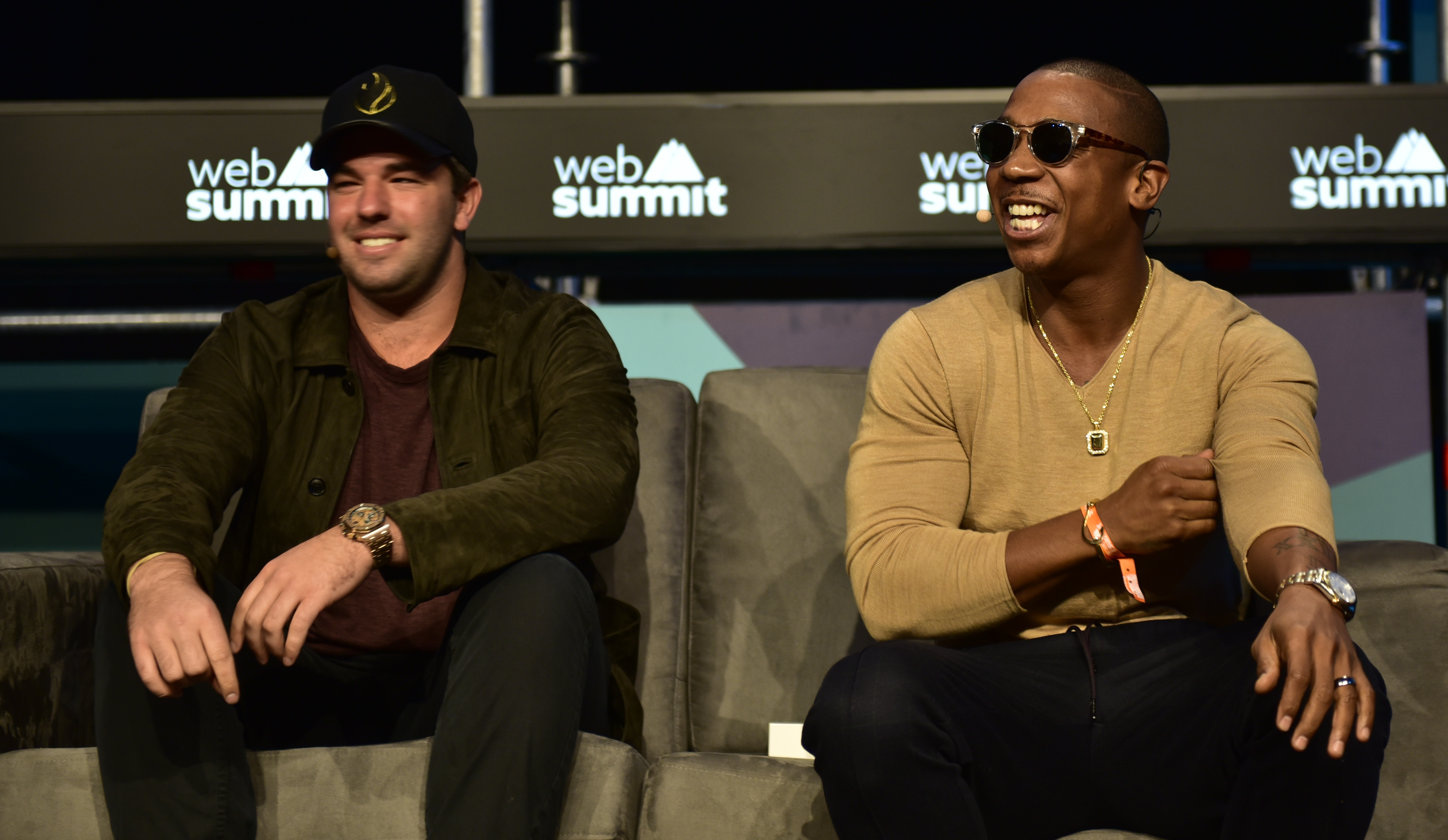 _DSC0839